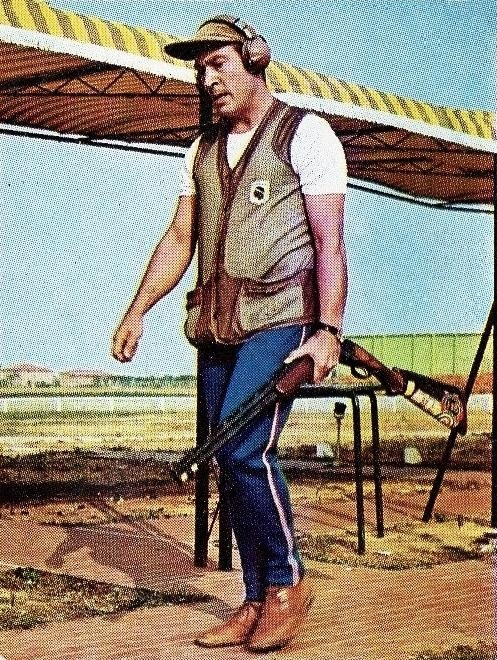 CAMPIONI dello SPORT 1973/74-Figurina n.370- CARREGA - TIRO A VOLO